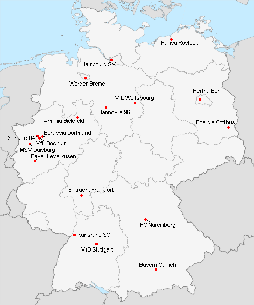 Répartition des clubs en 1.Bundesliga 2007-2008.